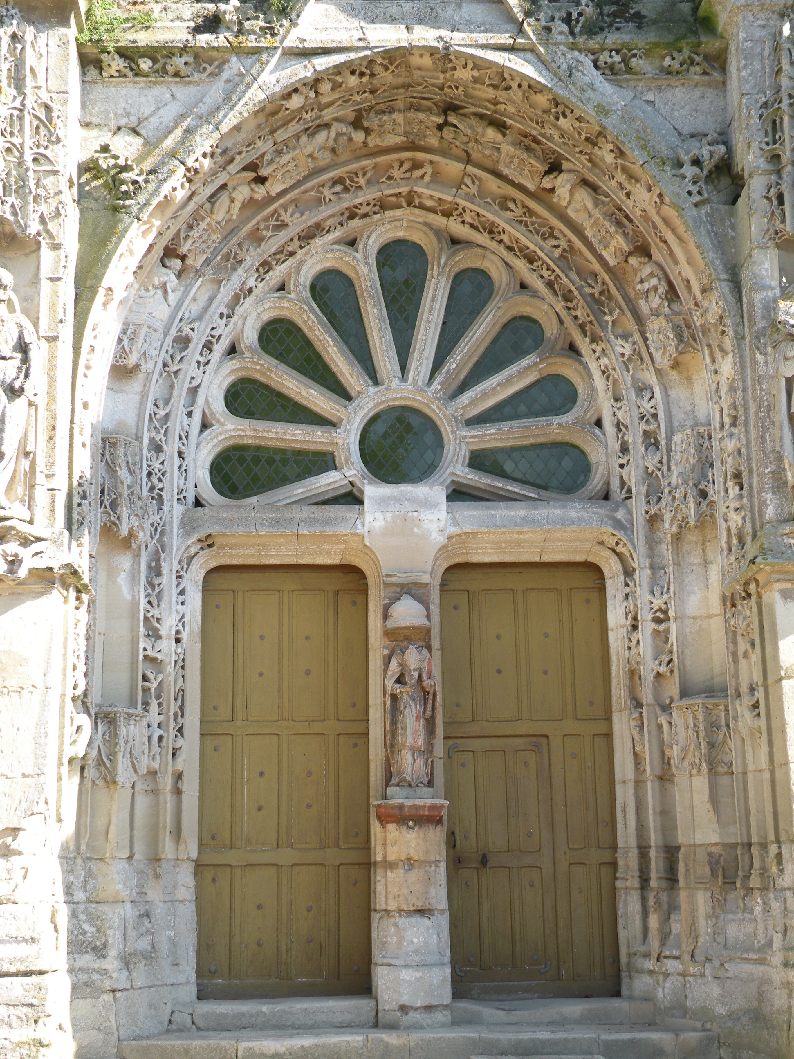 Église Saint-Denis de Serans